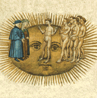 Dante e Beatrice incontrano i beati nel Cielo del Sole